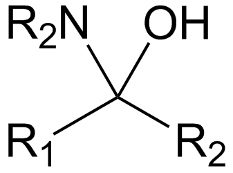 Hemiaminal algemene structuur